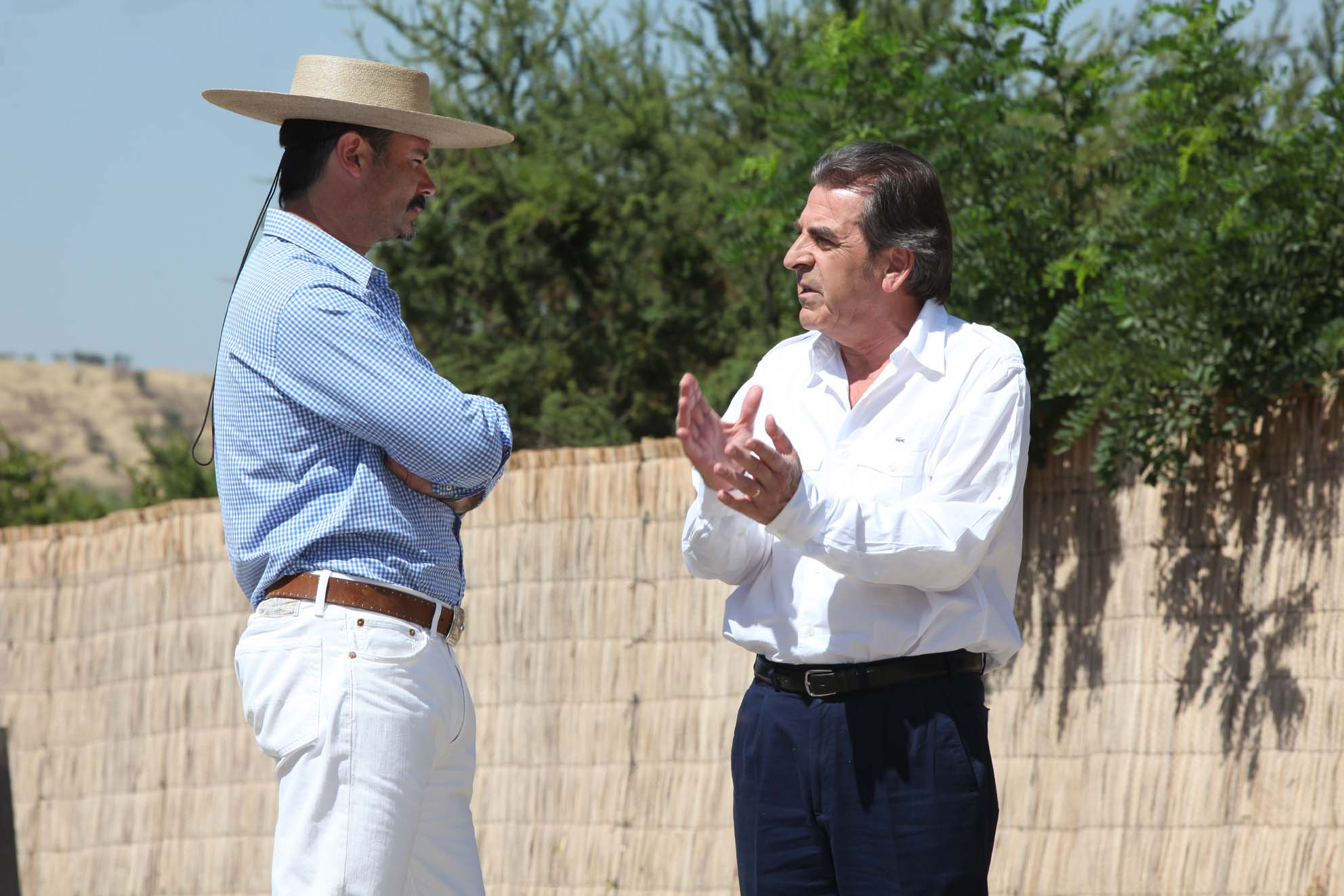 Felipe Camiroaga, TV host, Eduardo Frei, politician.